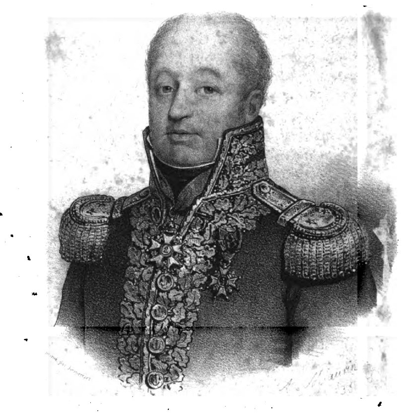 Pierre-Nicolas Rolland